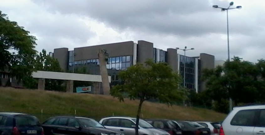 Fotografia de parte da Universidade do Minh - Polo de Braga